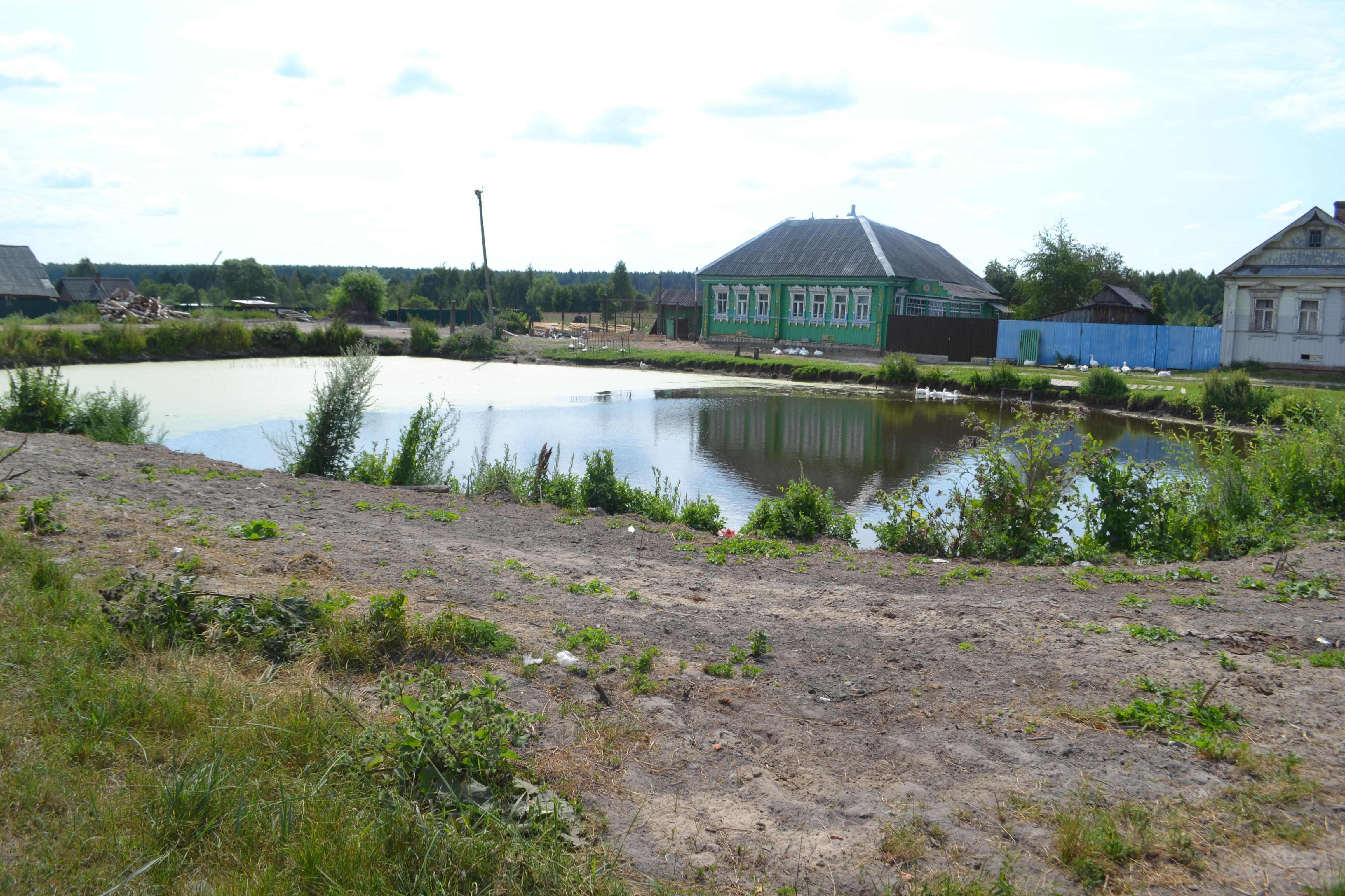 Пруд в деревне Обухово (Шатурский район)